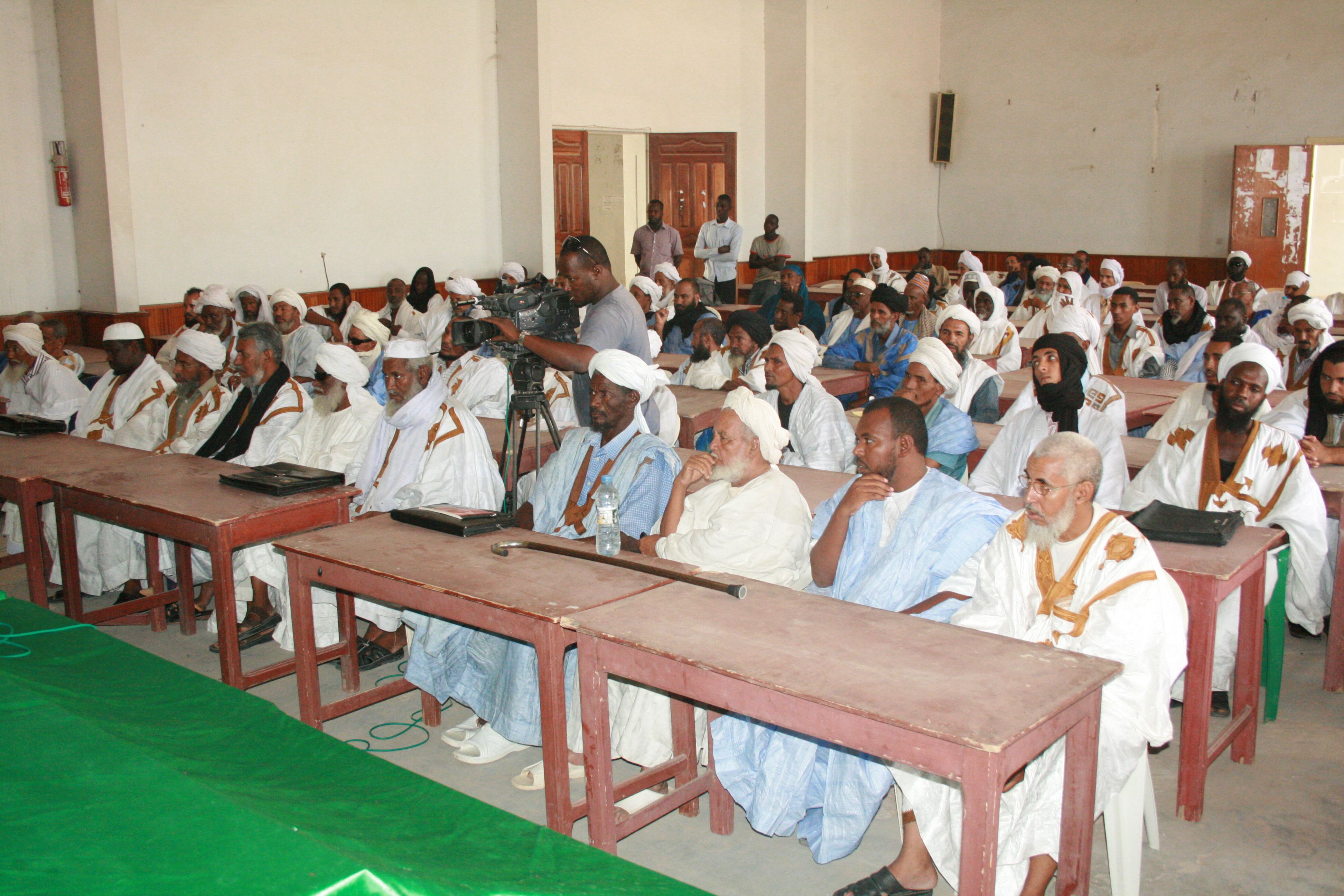 [Jemal Oumar] Mauritanian imams undergo training in Nouakchott on how to deal with modern problems, including the threat of terrorism. الأئمة الموريتانيون يشاركون في دورة تكوينية بنواكشوط حول طرق التعامل مع المشاكل المعاصرة بما فيها خطر الإرهاب Les imams mauritaniens suivent une formation à Nouakchott sur la manière de répondre aux problèmes du monde moderne, notamment à la menace du terrorisme.